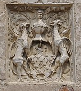 Blason de la famille Ragny de la Madelaine : 2 griffons de superbe allure, d'hermine à 3 branches et la gueule chargée de 11 coquilles d'or